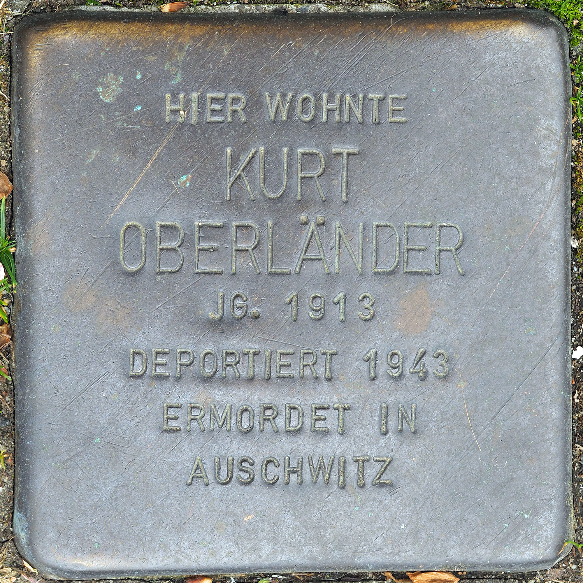 Stolpersteine MG: Oberländer, Kurt